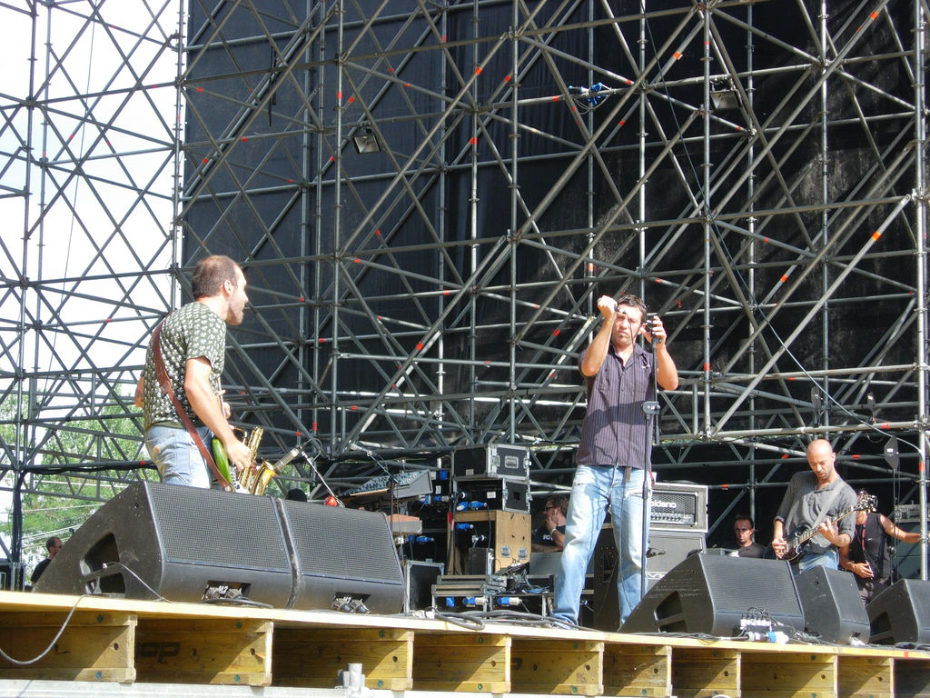 Independent days festival 2005 bologna